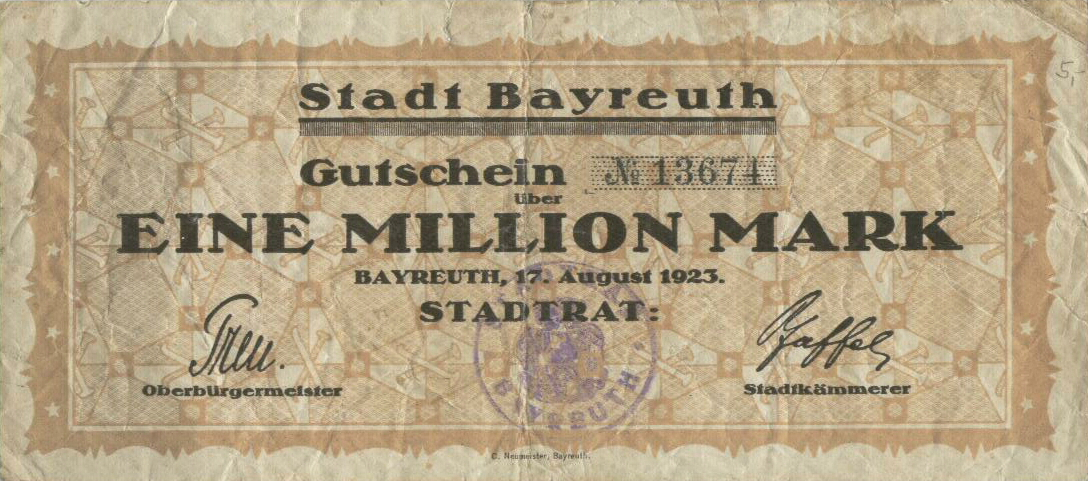 Notgeld aus Bayreuth: Gutschein über eine Million Mark von 1923 (Rückseite unbedruckt)